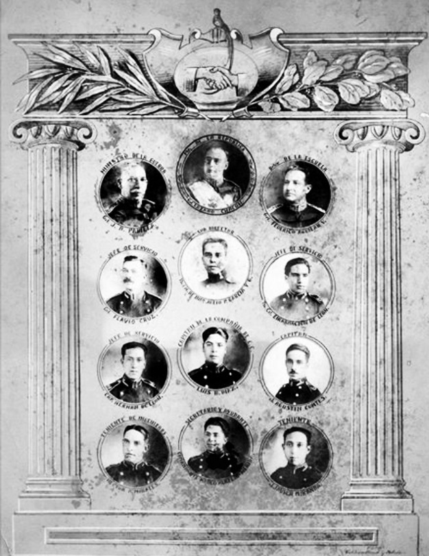 Estado Mayor del presidente Lazaro Chacon en 1926.